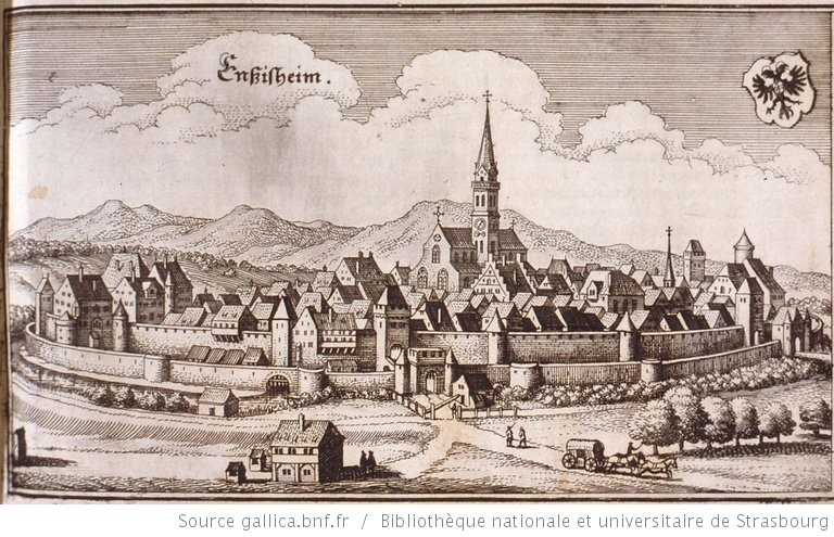 Ensisheim